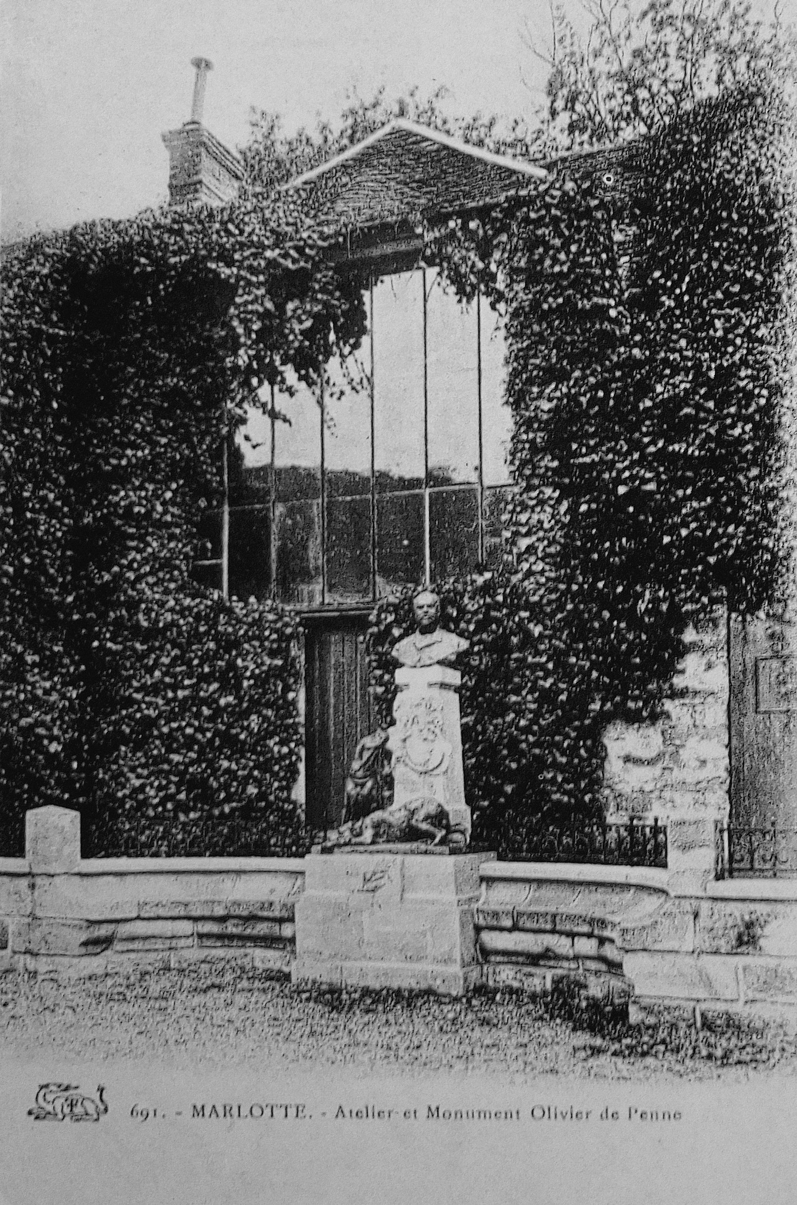 Marlotte (Bourron-Marlotte, Seine-et-Marne) L'atelier de Charles-Olivier de Penne et le monument en son honneur, sculpteur Arthur Le Duc (1903). Carte postale vers 1910, photographe inconnu, collection particulière.